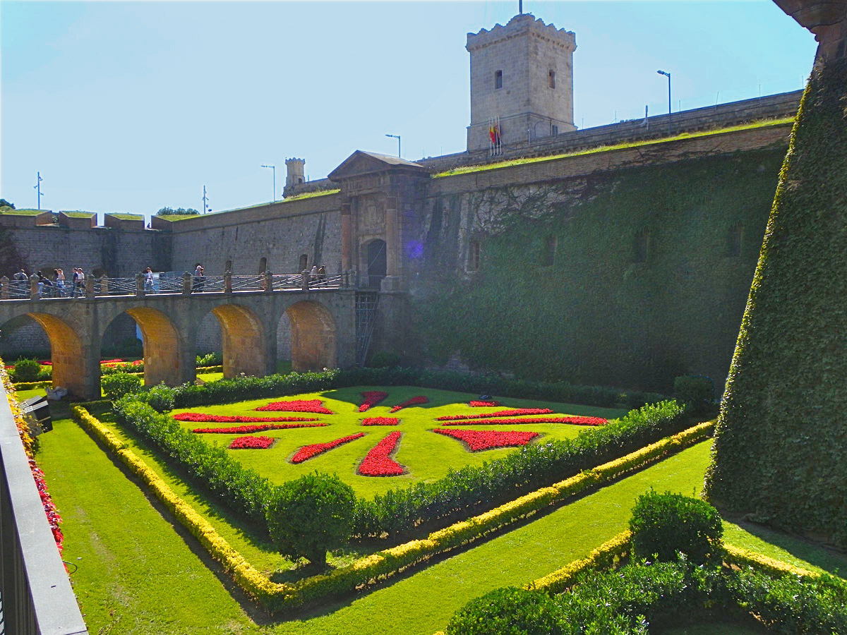 Barcelona, entrada del castell de Montjuïc